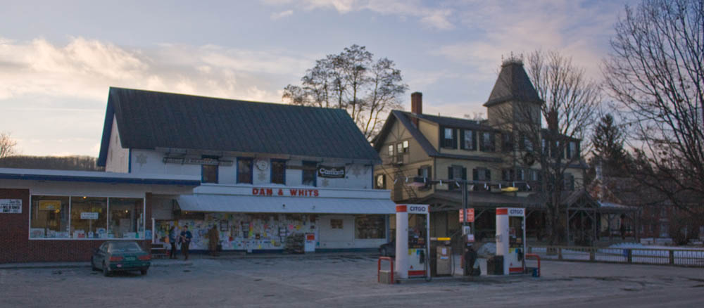 Norwich, Vermont general store and Inn